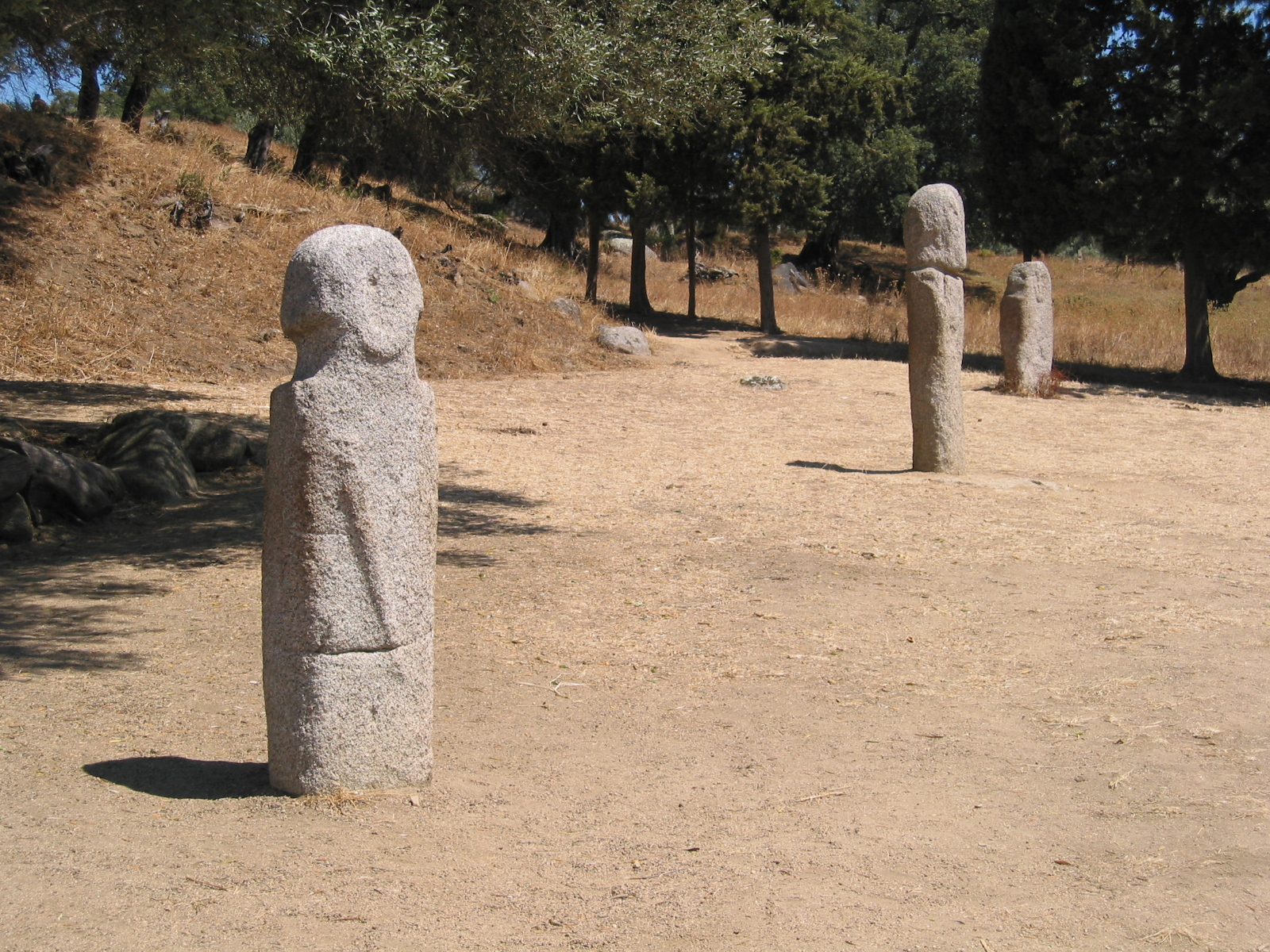 Filitosa (Corse-du-Sud, France)